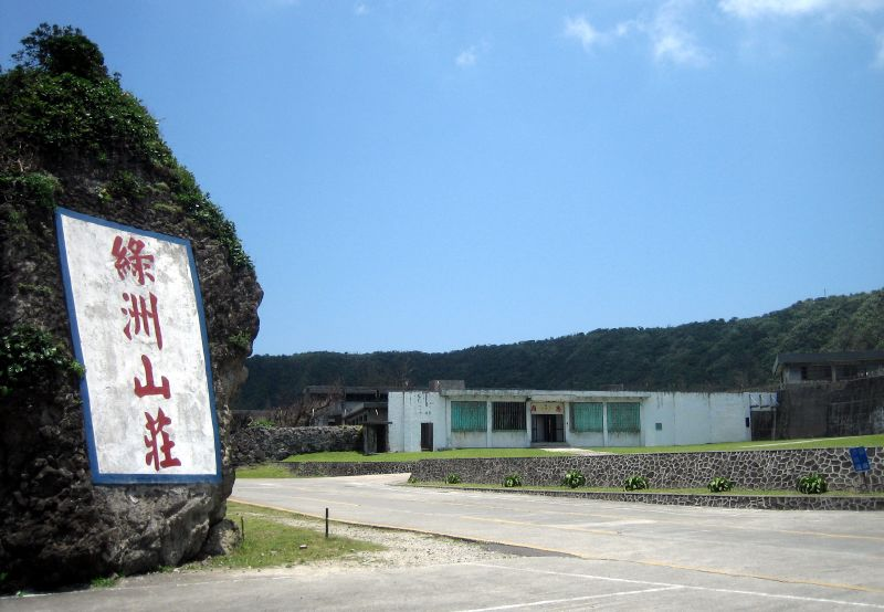 「新生訓導處」西側一座高牆式監獄